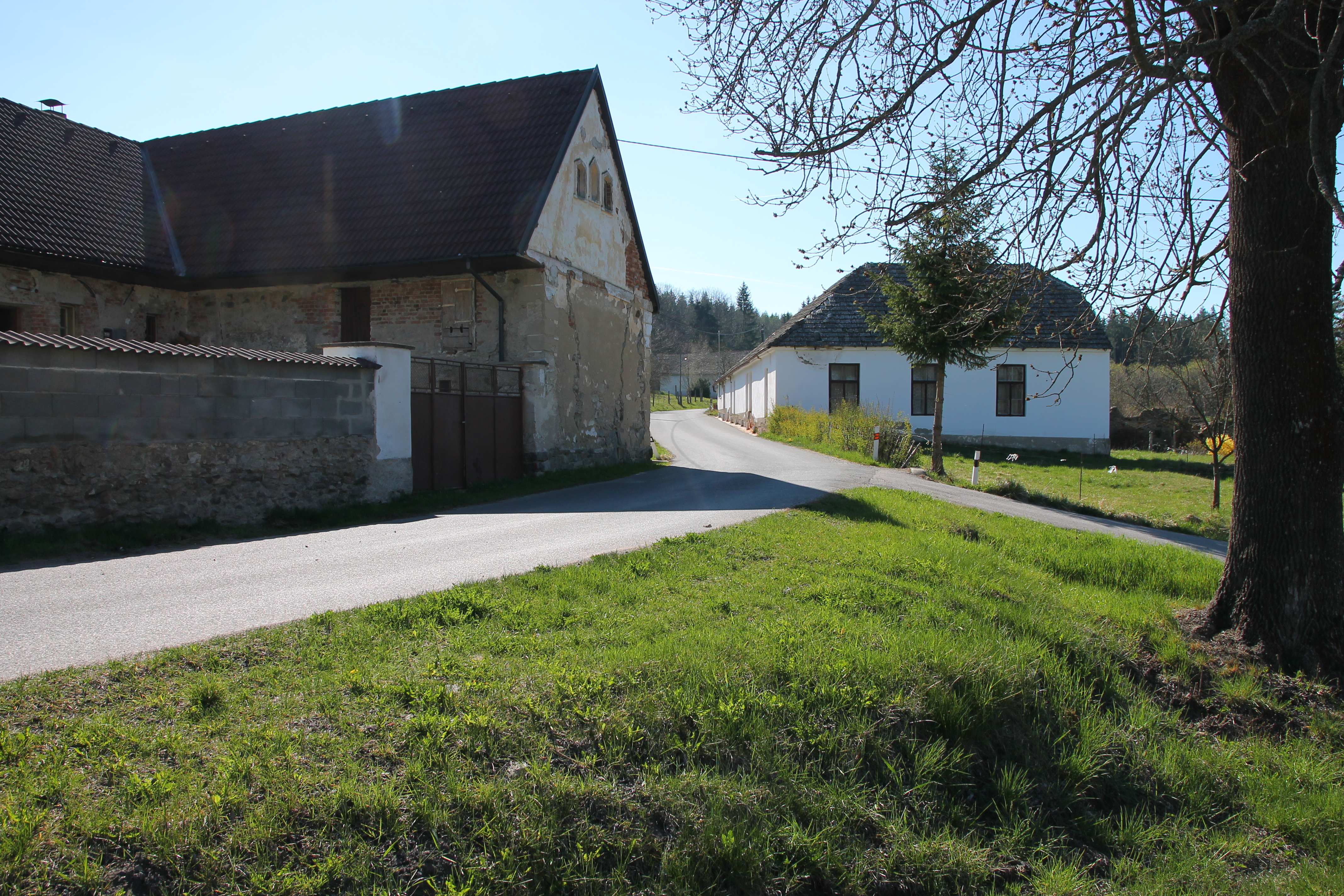 Chalupy v Parýzku